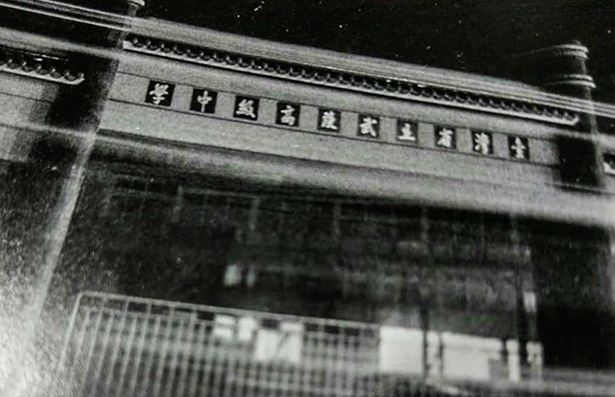 中文（台灣）: 這是武陵高中在省立時期的校門。拍攝時間在晚上。